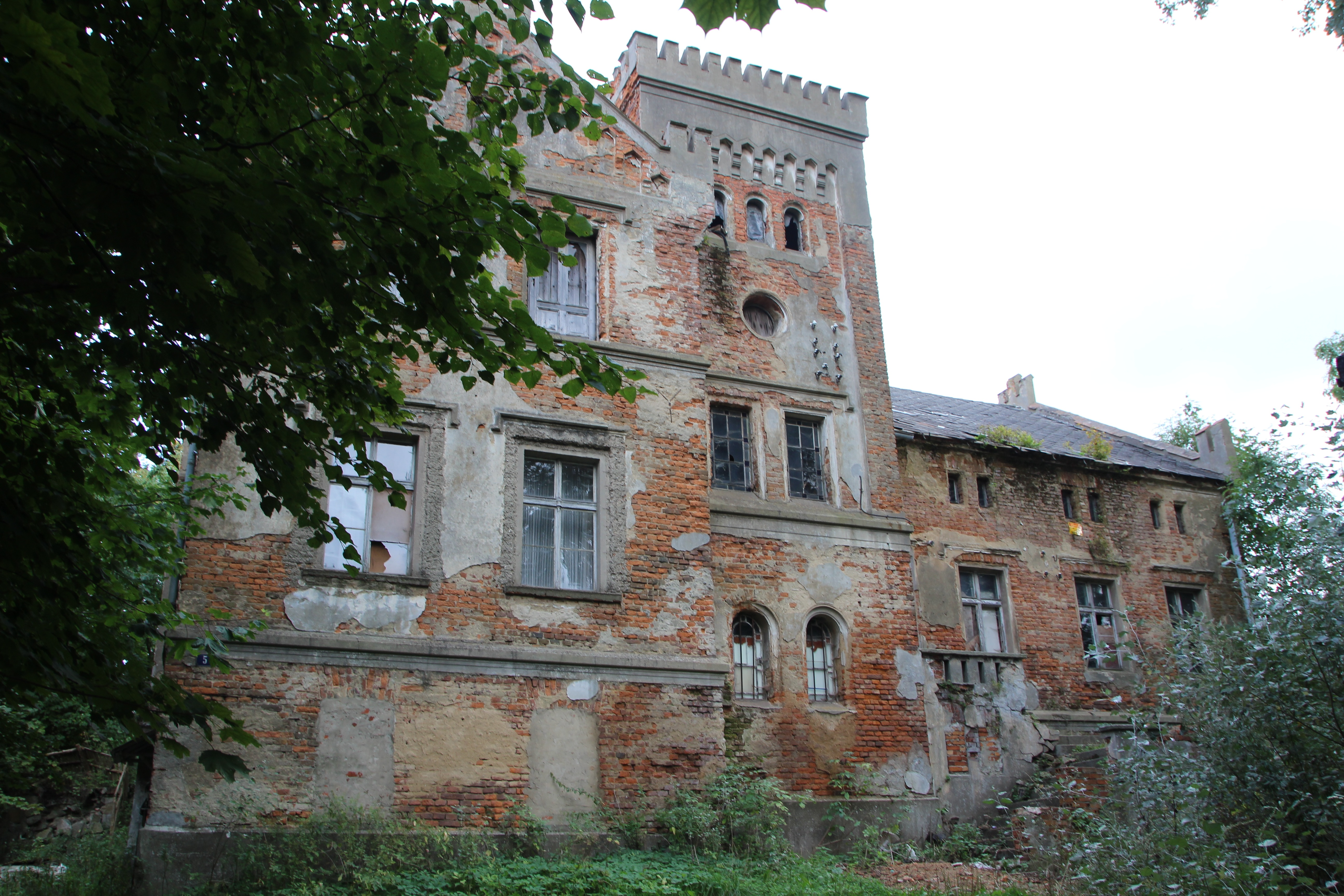 Zurzyce – wieś w Polsce położona w województwie opolskim, w powiecie nyskim, w gminie Kamiennik.